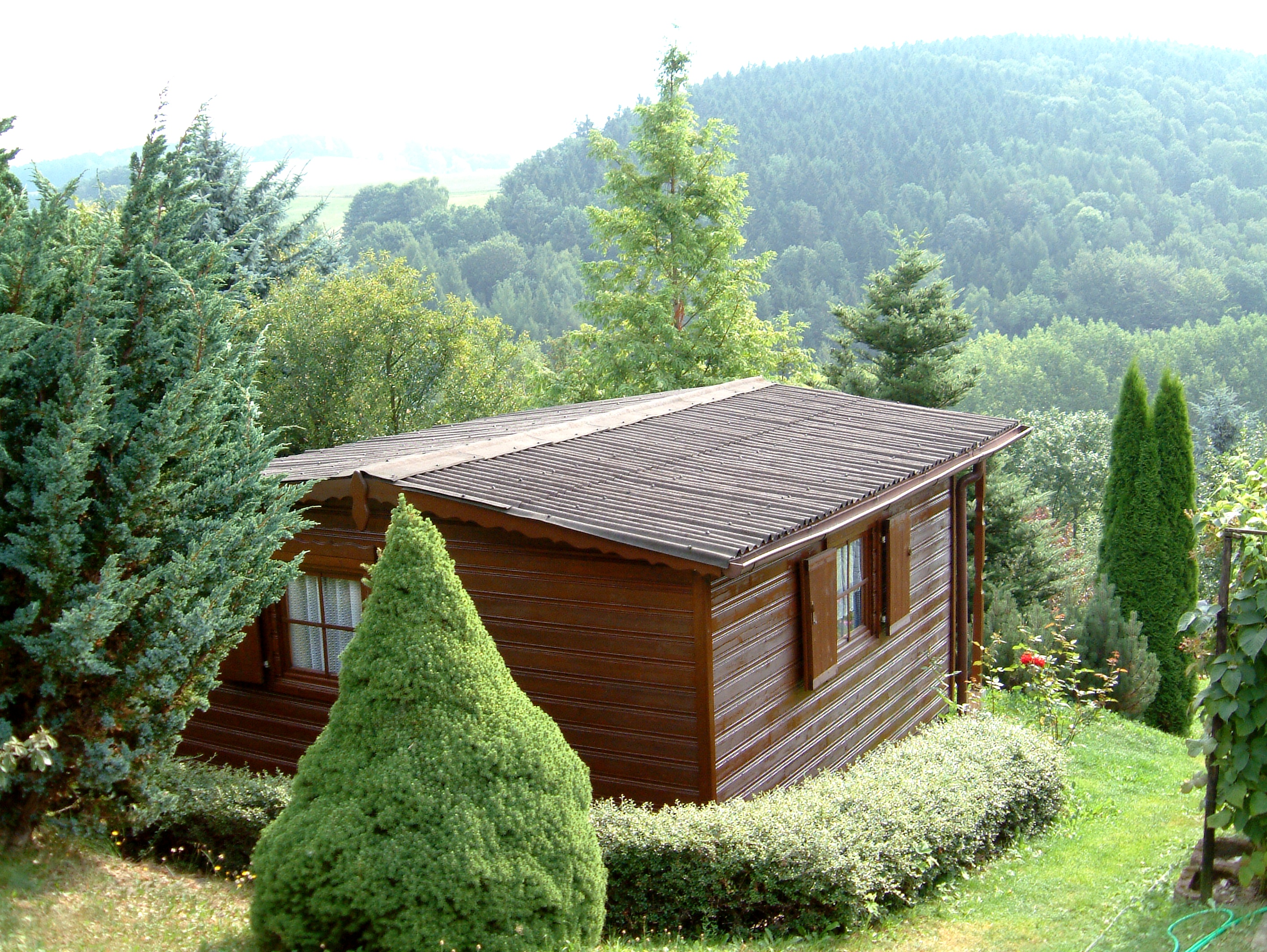 Arbour_-_Gartenlaube_14_August_2003.jpg